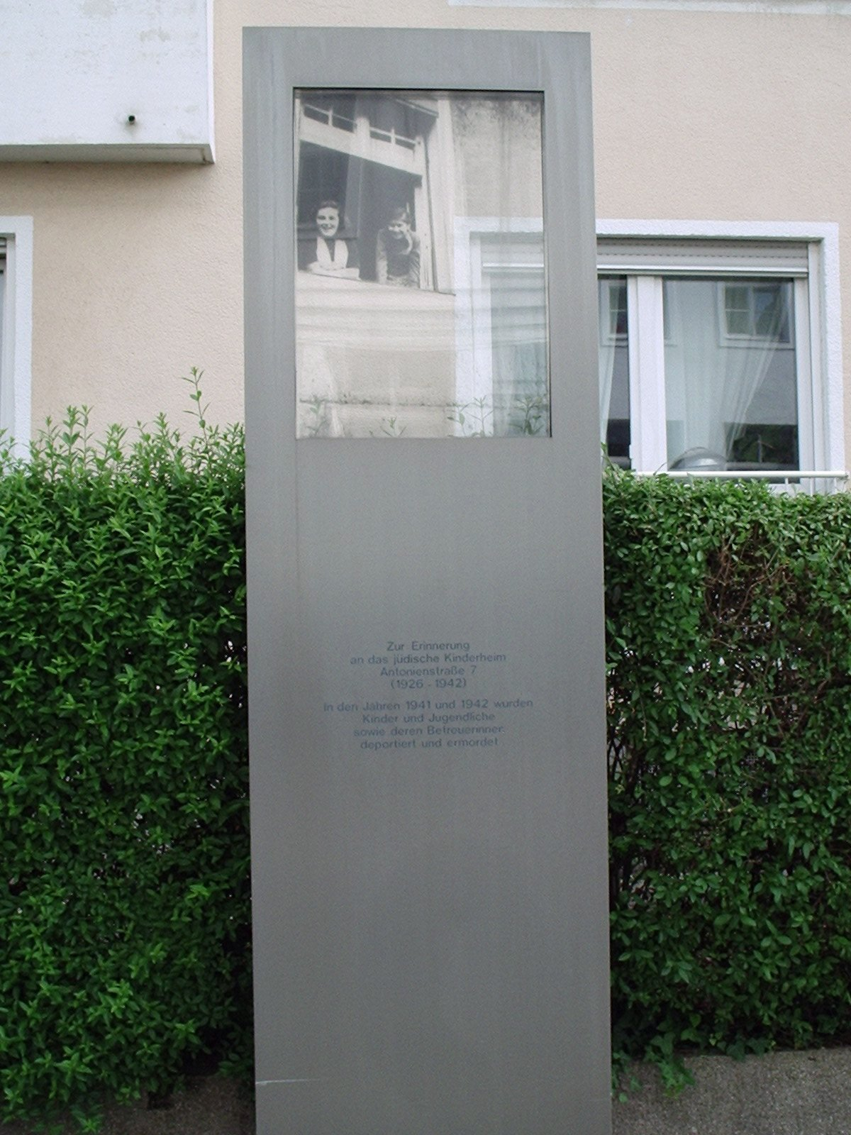 Mahnmal für das ehemalige jüdische Kinderheim (Antonienheim) an der Antonienstraße 7. Geschaffen 2002 von Hermann Kleinknecht.